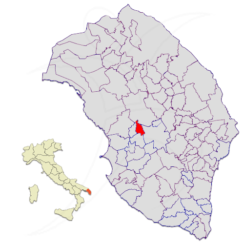 Il territorio del comune di Aradeo nella Provincia di Lecce